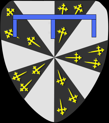 blasonnement de la branche Brienne de la famille d'Enghien